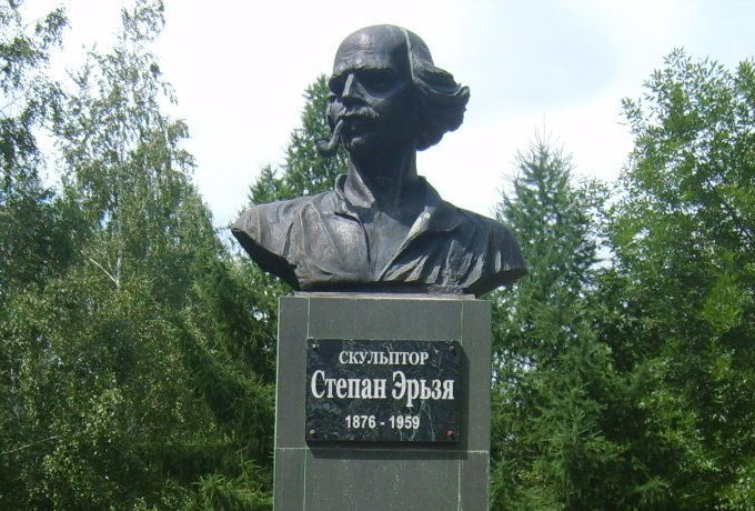 Памятник Степану Эрьзя в Ульяновске